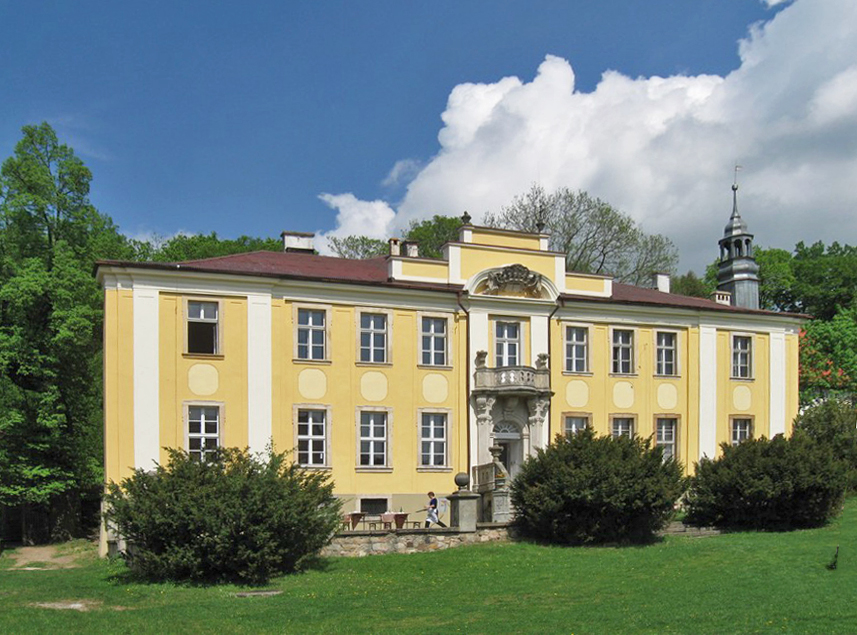 Łupki - zespół pałacowy „Wleński Gródek”: pałac „Lenno”